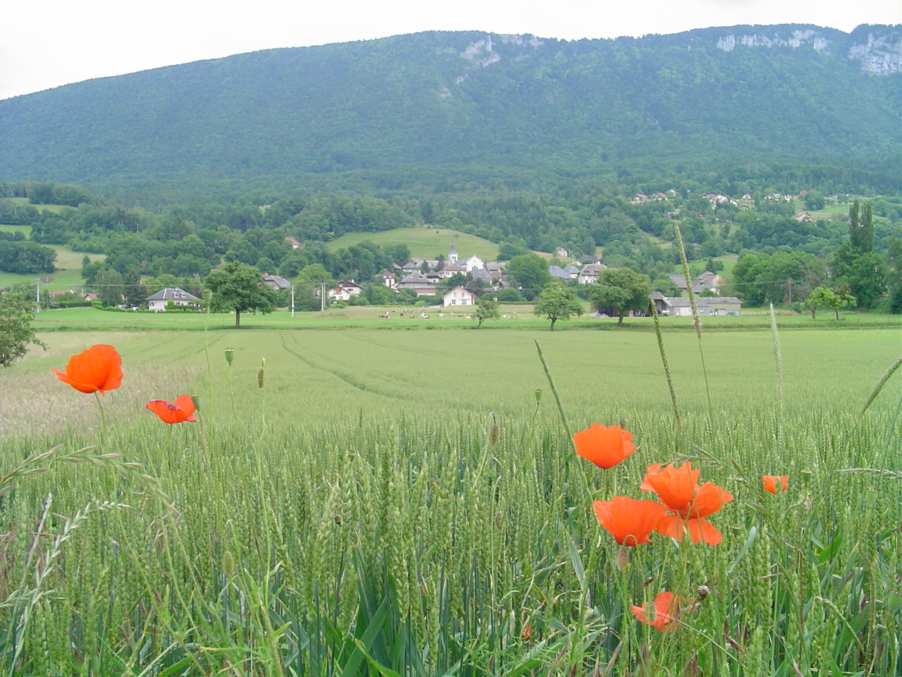 Centre de Viuz avec le Semnoz en fond de plan.